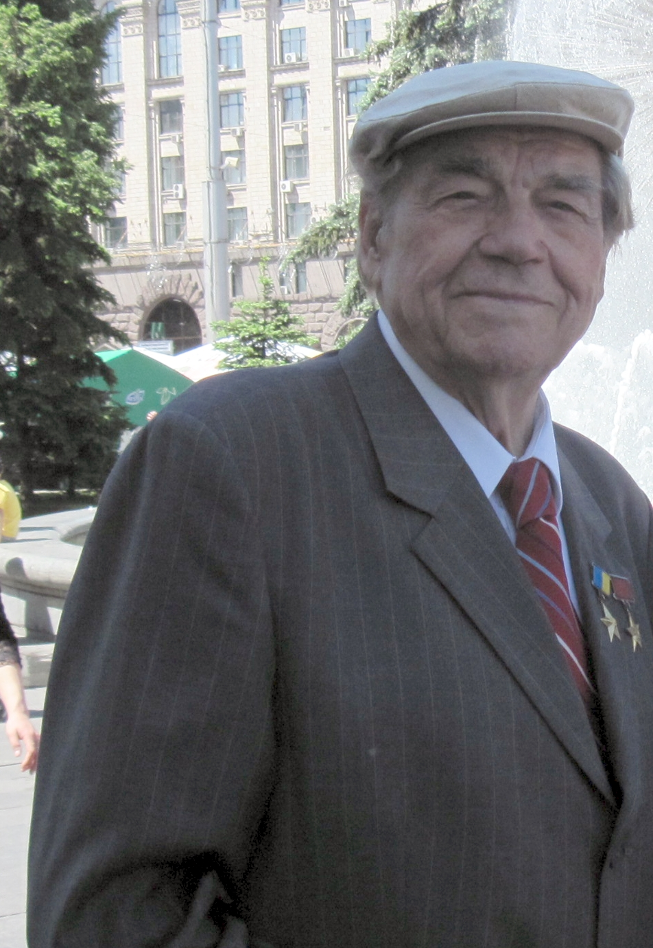 Дмитро Гнатюк на День Києва.